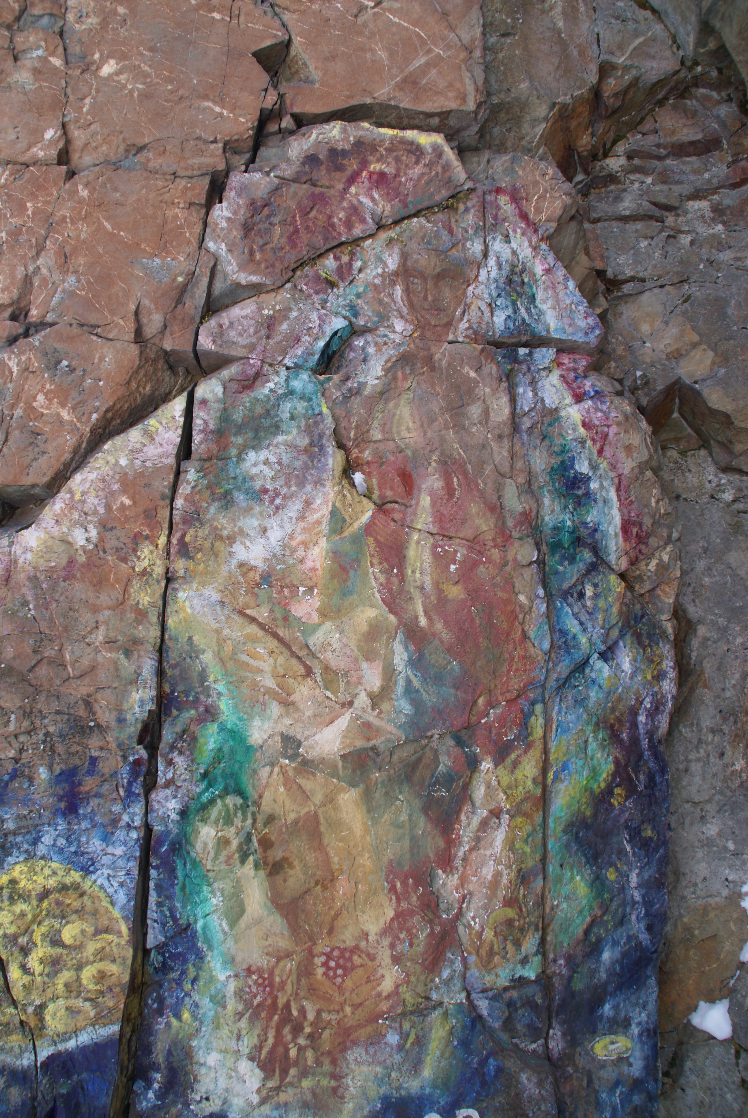 Изображение персонажа "Азовка" из фольклора и сказа П. П. Бажова на горе Азов, окрестность г. Полевской This image is related to the protected area of Russia number 6610536